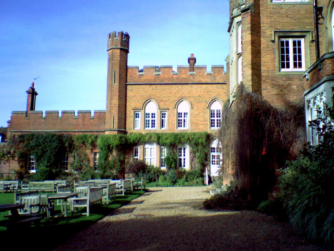 Cumberland Lodge